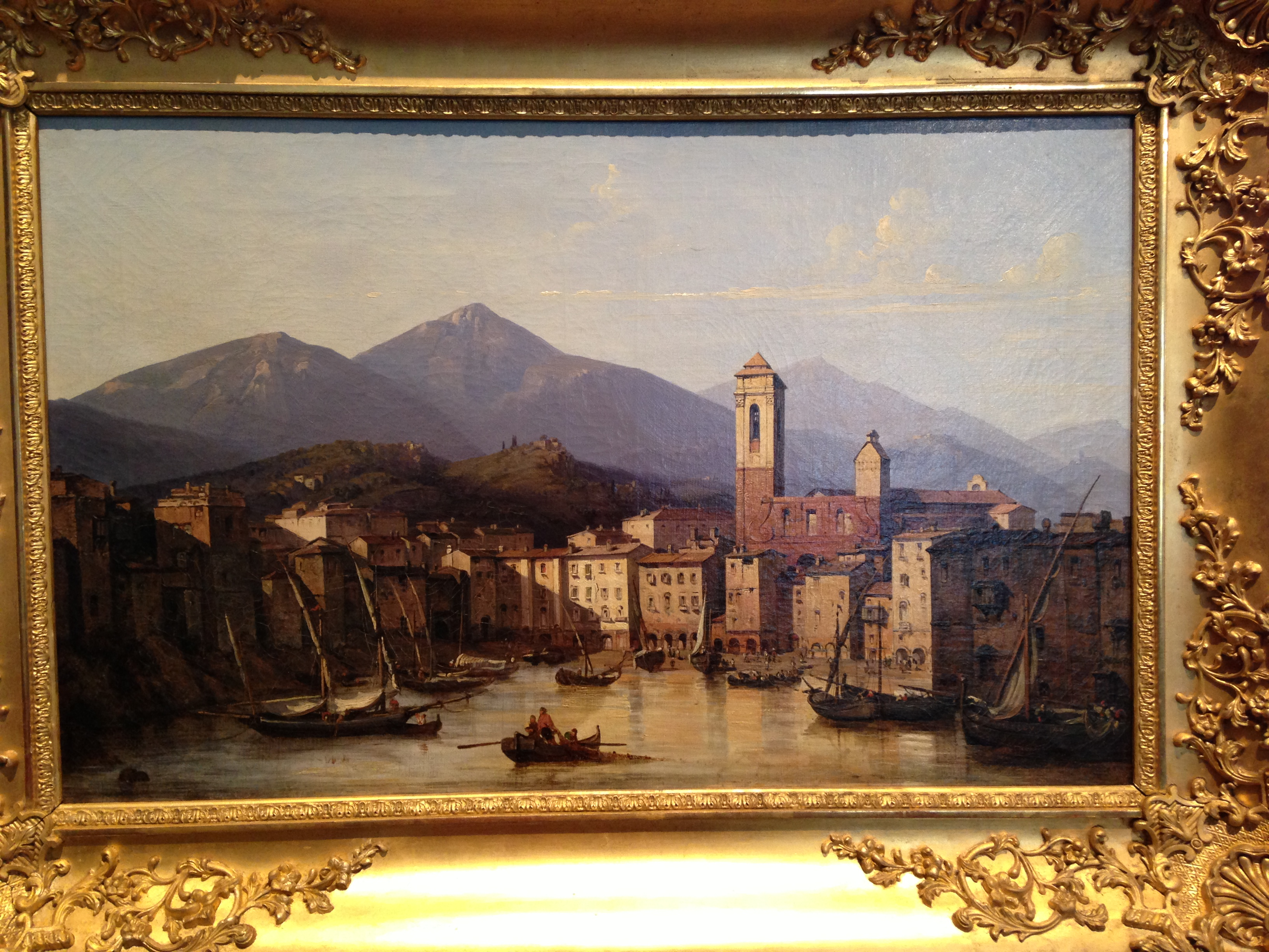 Vue du port de Bastia - huile sur toile de 1839 de Frederic Bourgeois de Mercey (1805-1860) exposée au musée d'ethnologie de Corse